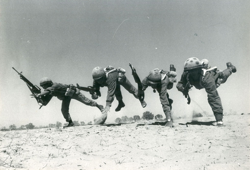 טירונות שריון.